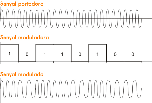 esquema fsk